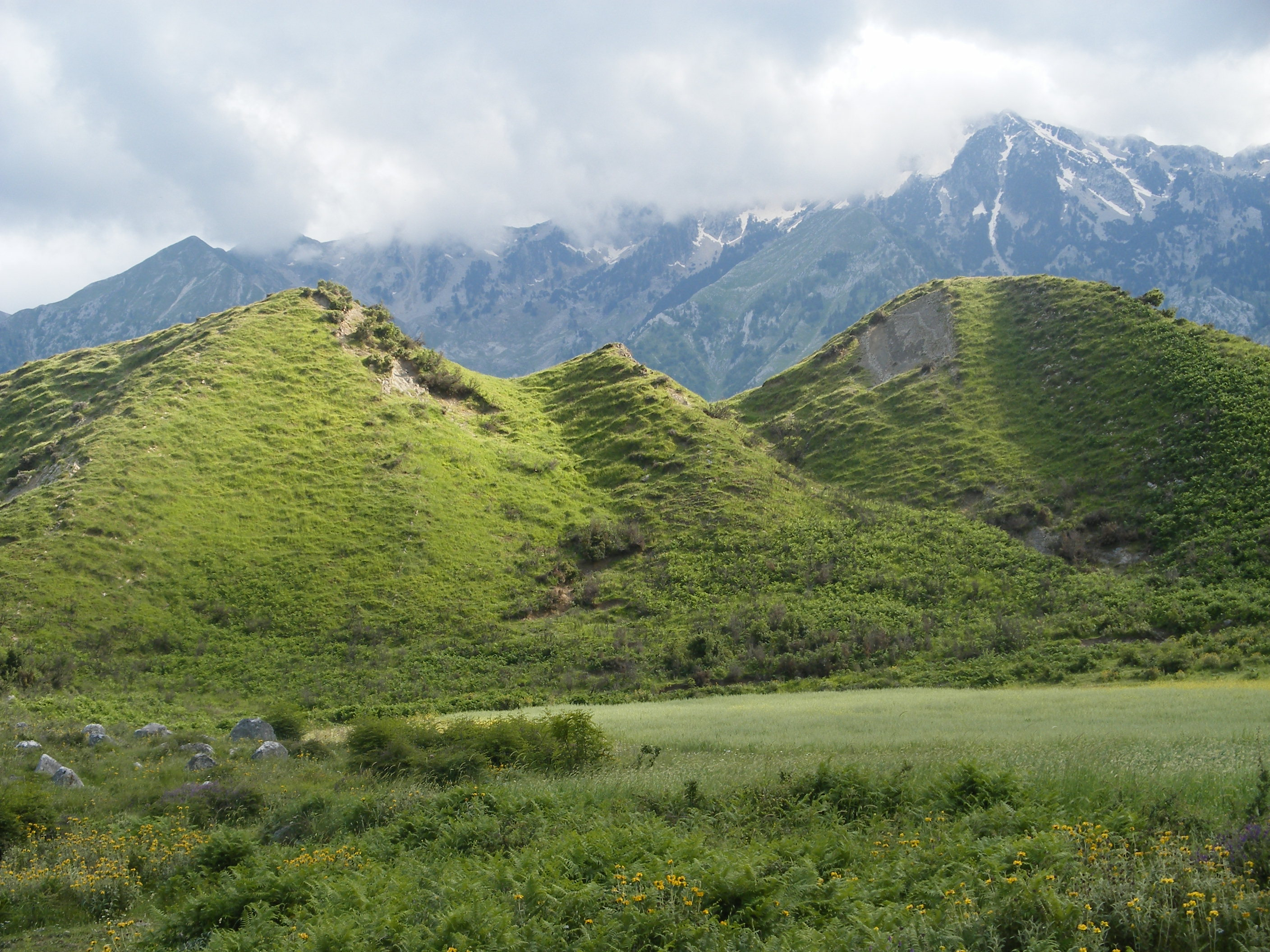 Hills in Horë-Vranisht, Vlorë District, Albania